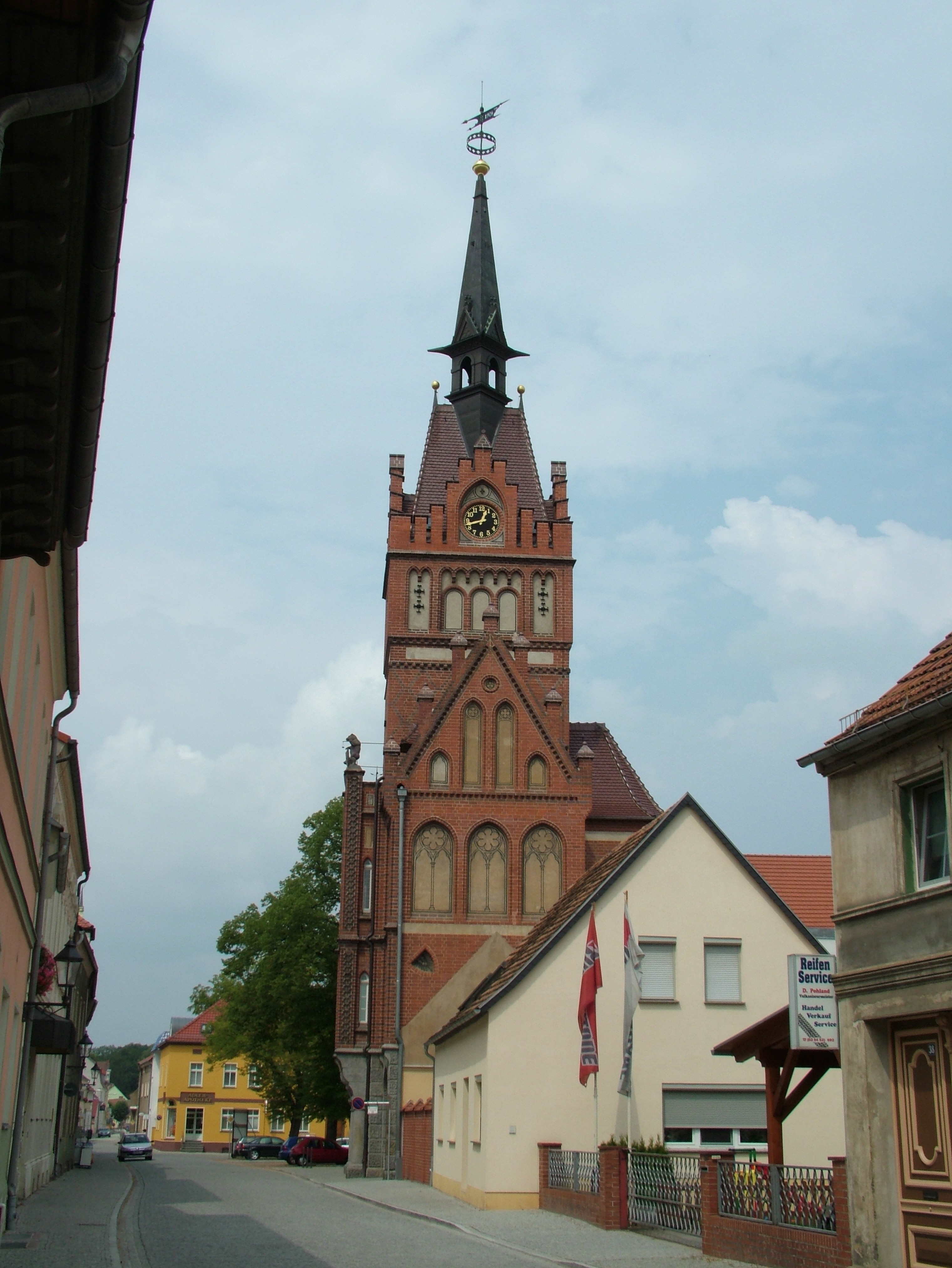 Golßen, die Gemeindeverwaltung